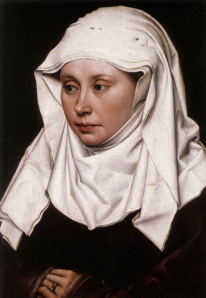 Porträt einer Frau